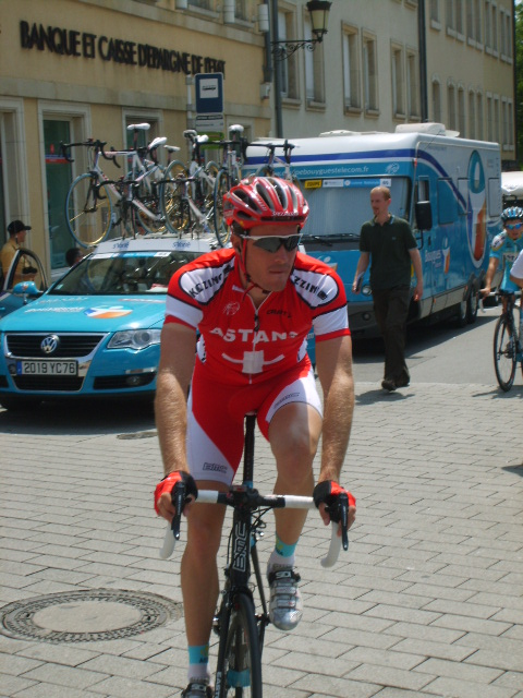 Grégory Rast der Sieger der Luxemburg-Rundfahrt vor dem Start der zweiten Etappe